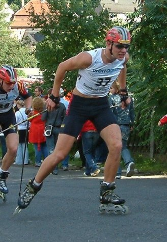 Christian Beetz during the Sommer Gand Prix in Steinbach-Hallenberg